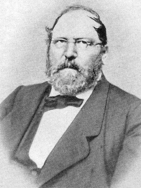 Gründer des Zementwerkes Mainz-Weisenau